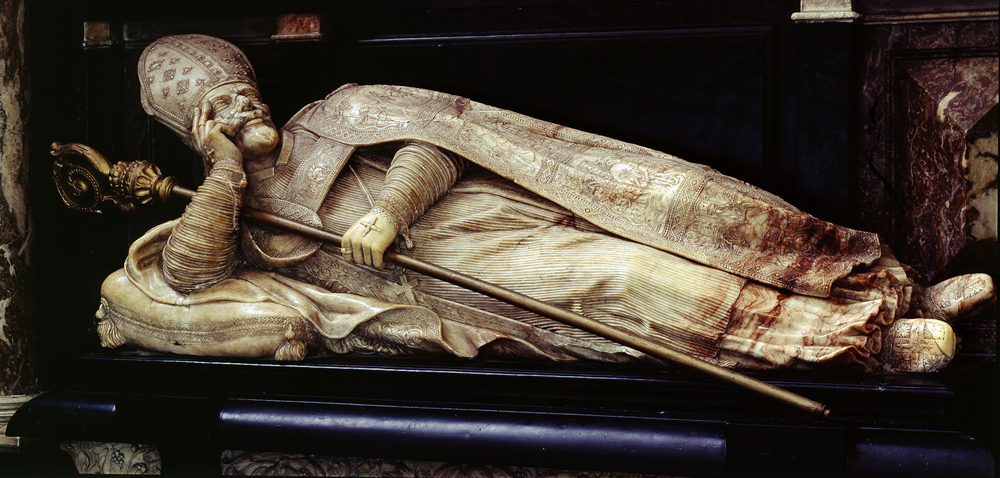 Sint-Baafskathedraal, Gent Praalgraf van Mgr. Damant; inv nr: 236